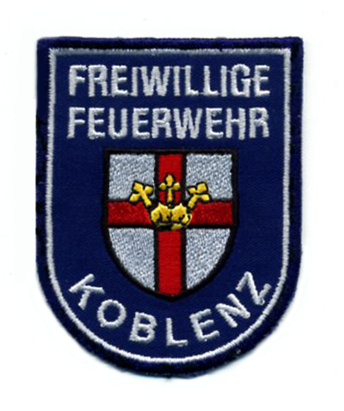 Ärmelabzeichen der FF Koblenz mit dem Stadtwappen so seit ca. 1997